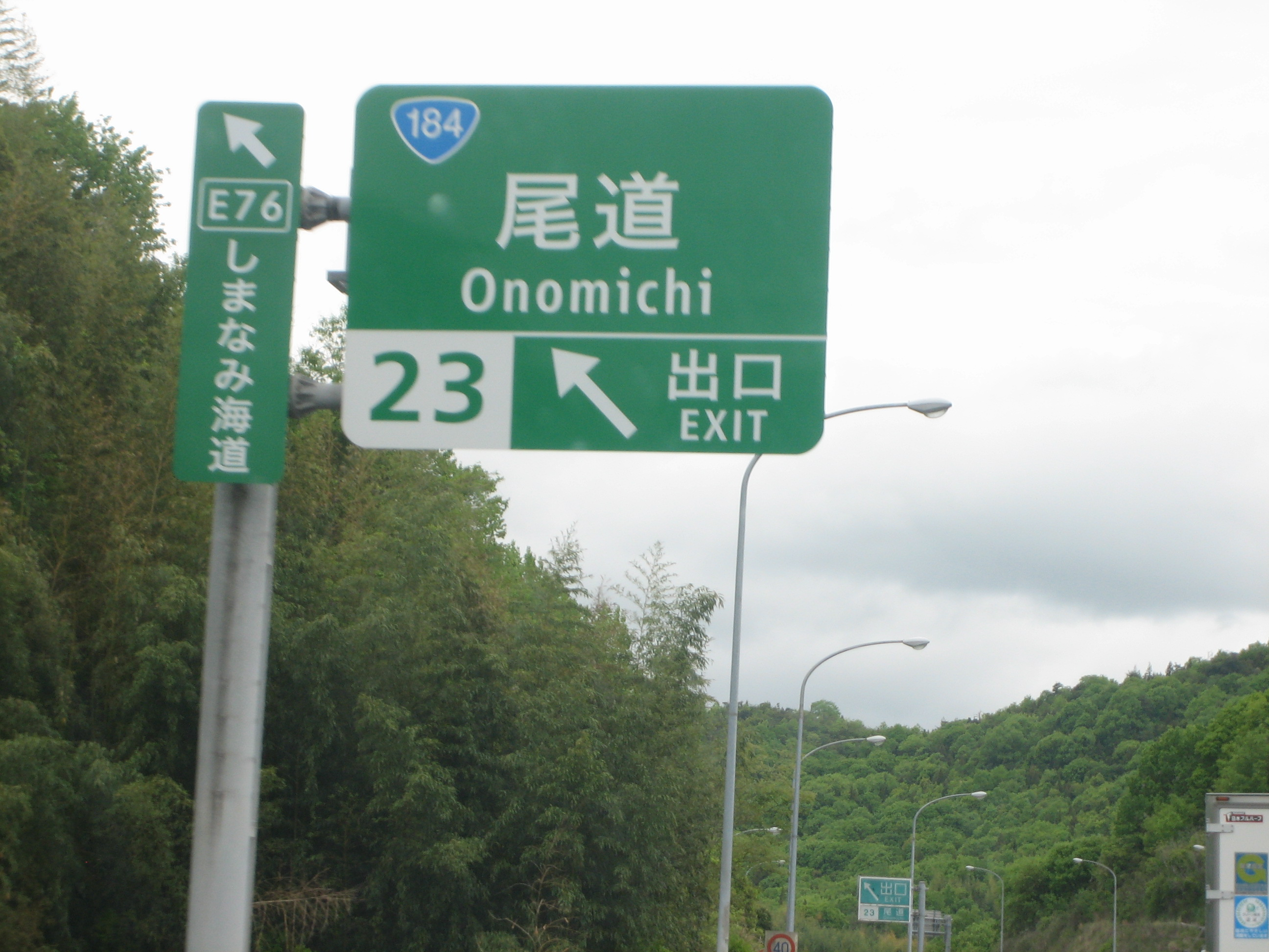 尾道IC